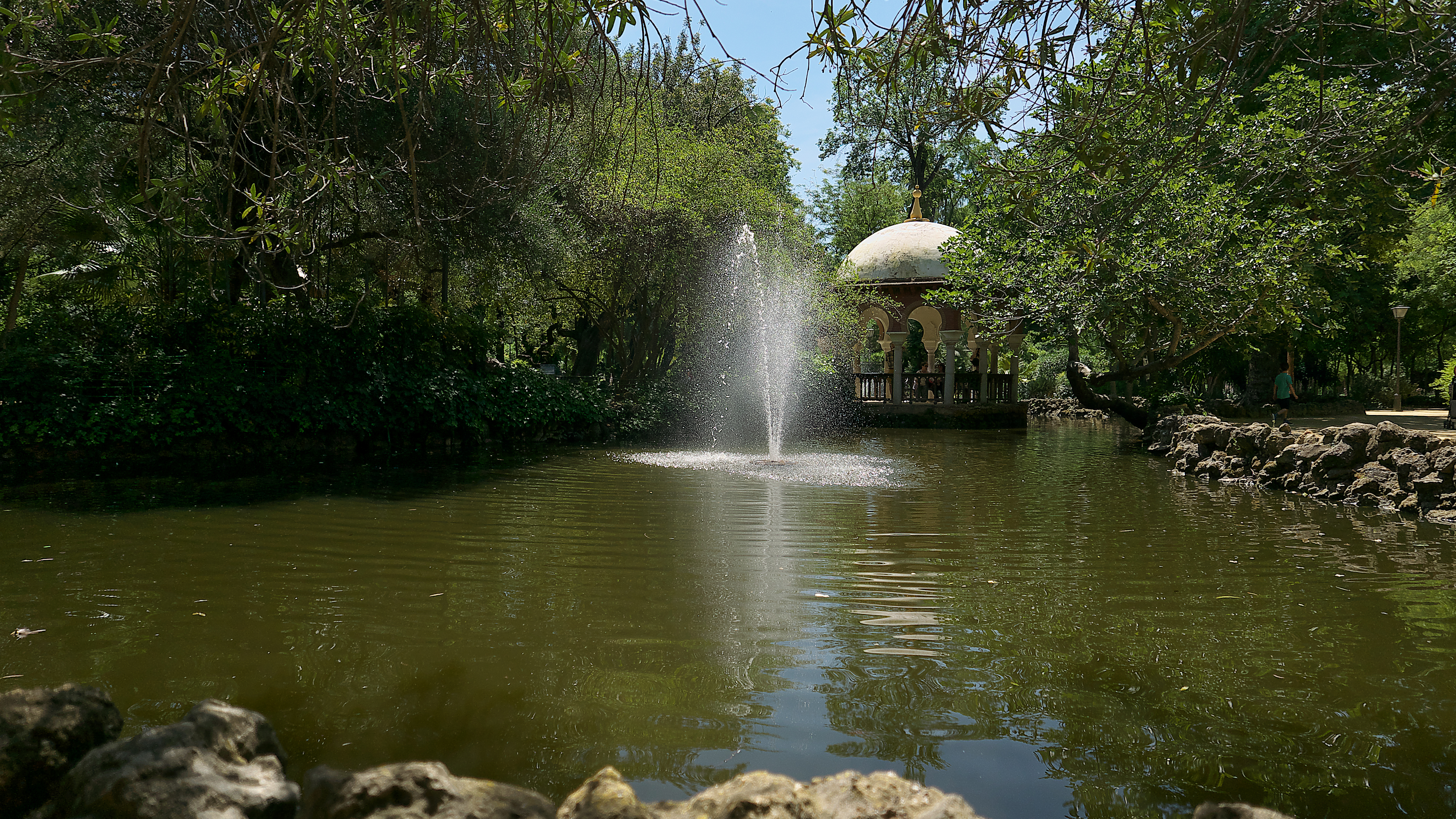 Parque de María Luisa. Visita obligada del parque.